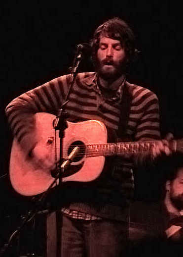 Ray LaMontagne concert Dublin.